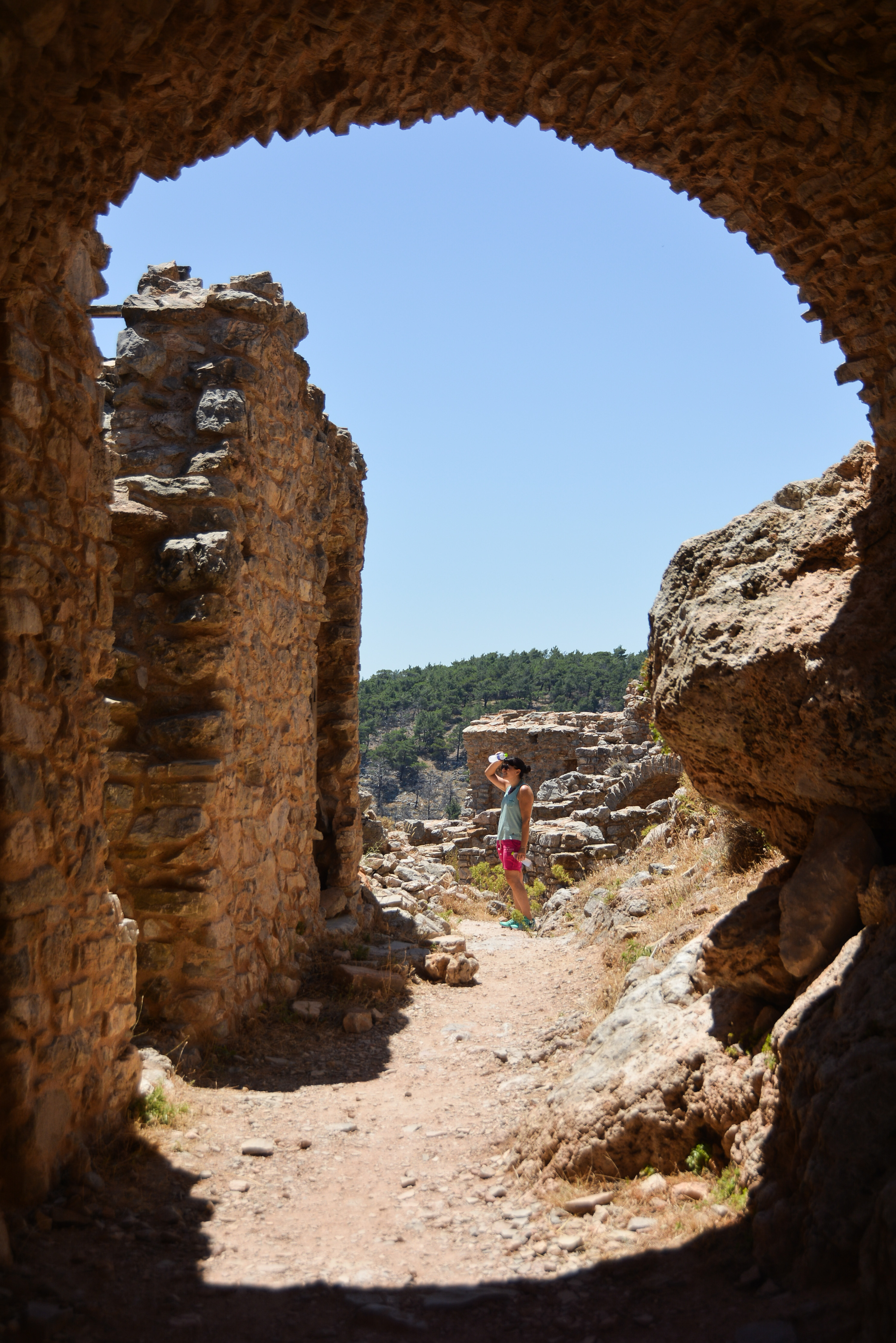 Ανάβατος«Ανάβατος Χίου»